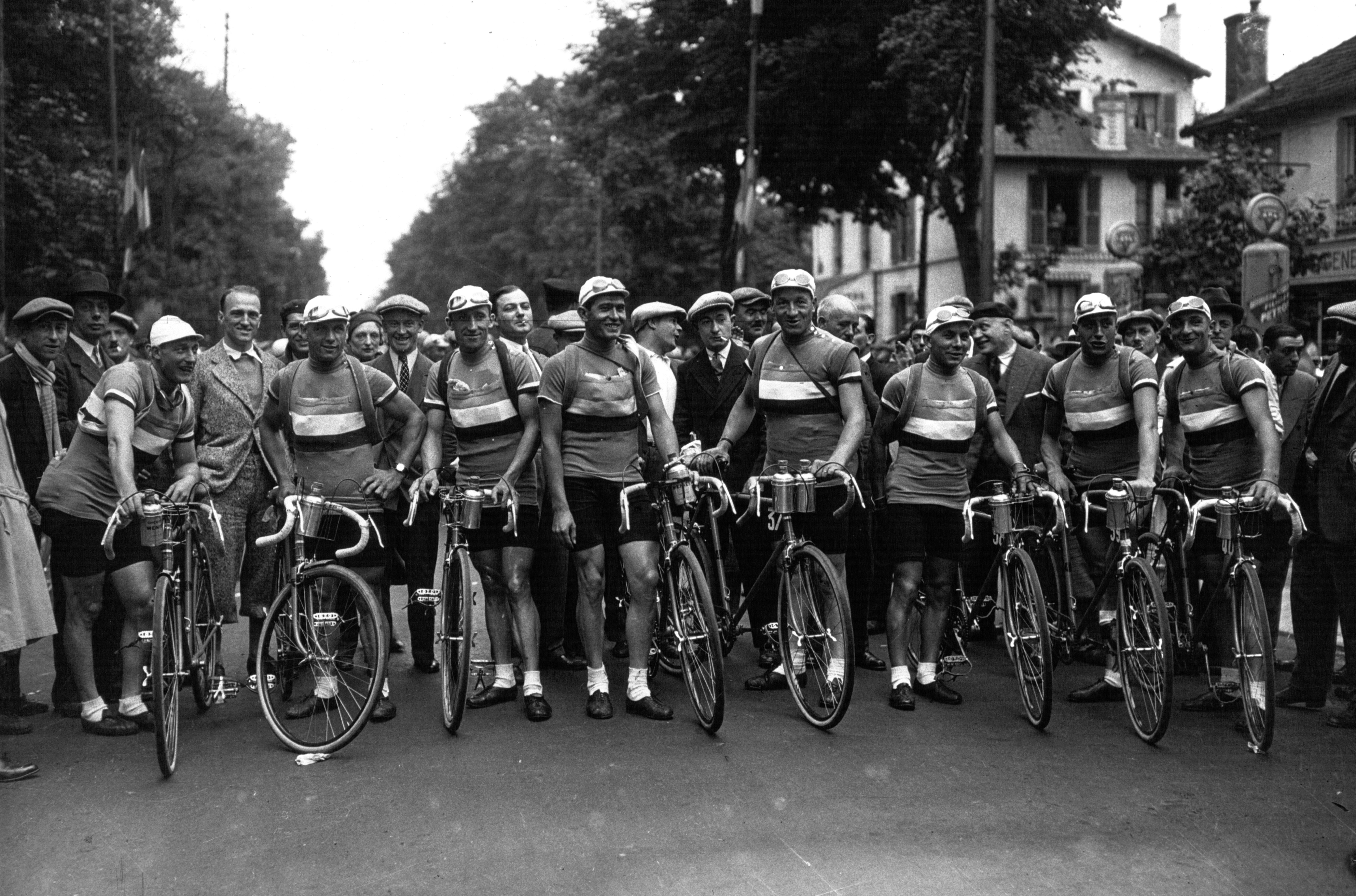 Équipe française lors du Tour de France 1932. De gauche à droite : André Leducq, Albert Barthélémy, Julien Moineau, Louis Peglion, Marcel Bidot, Maurice Archambaud, Georges Speicher, Roger Lapébie